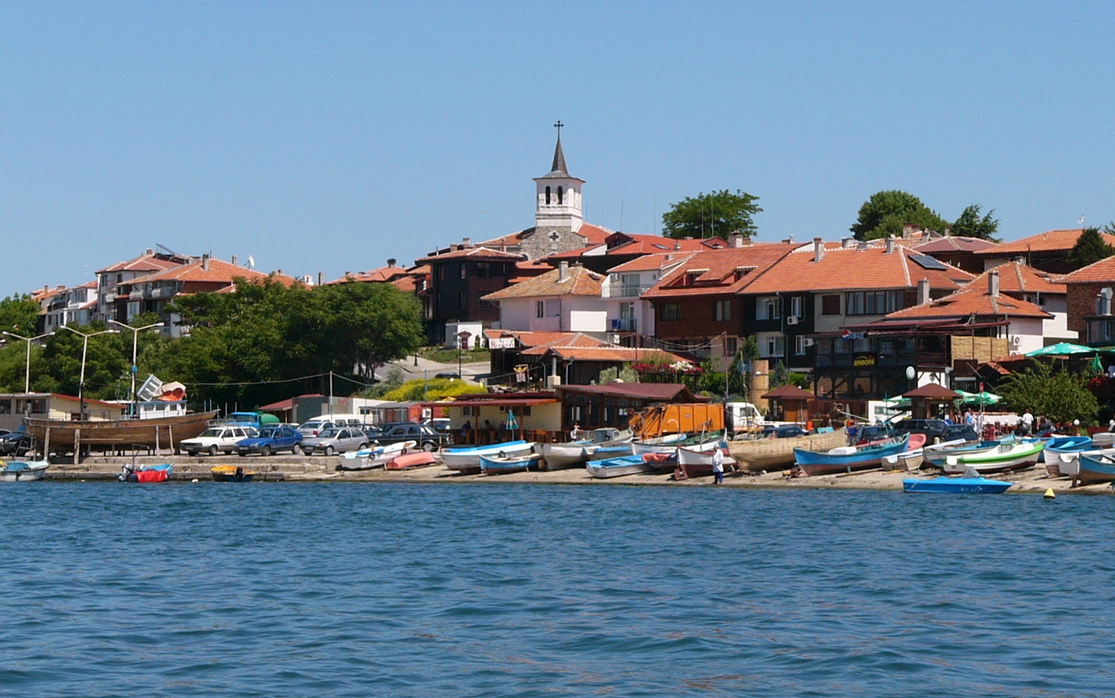 Nesebar